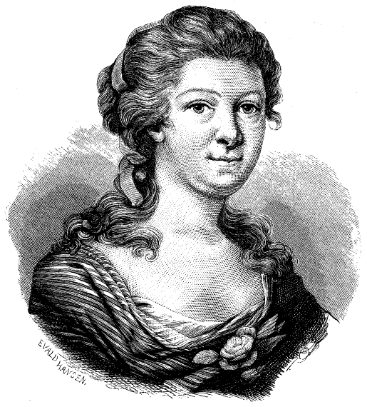 Hedvig Charlotta Nordenflycht, PD, Quelle: Svenska Familj-Journalen 1866